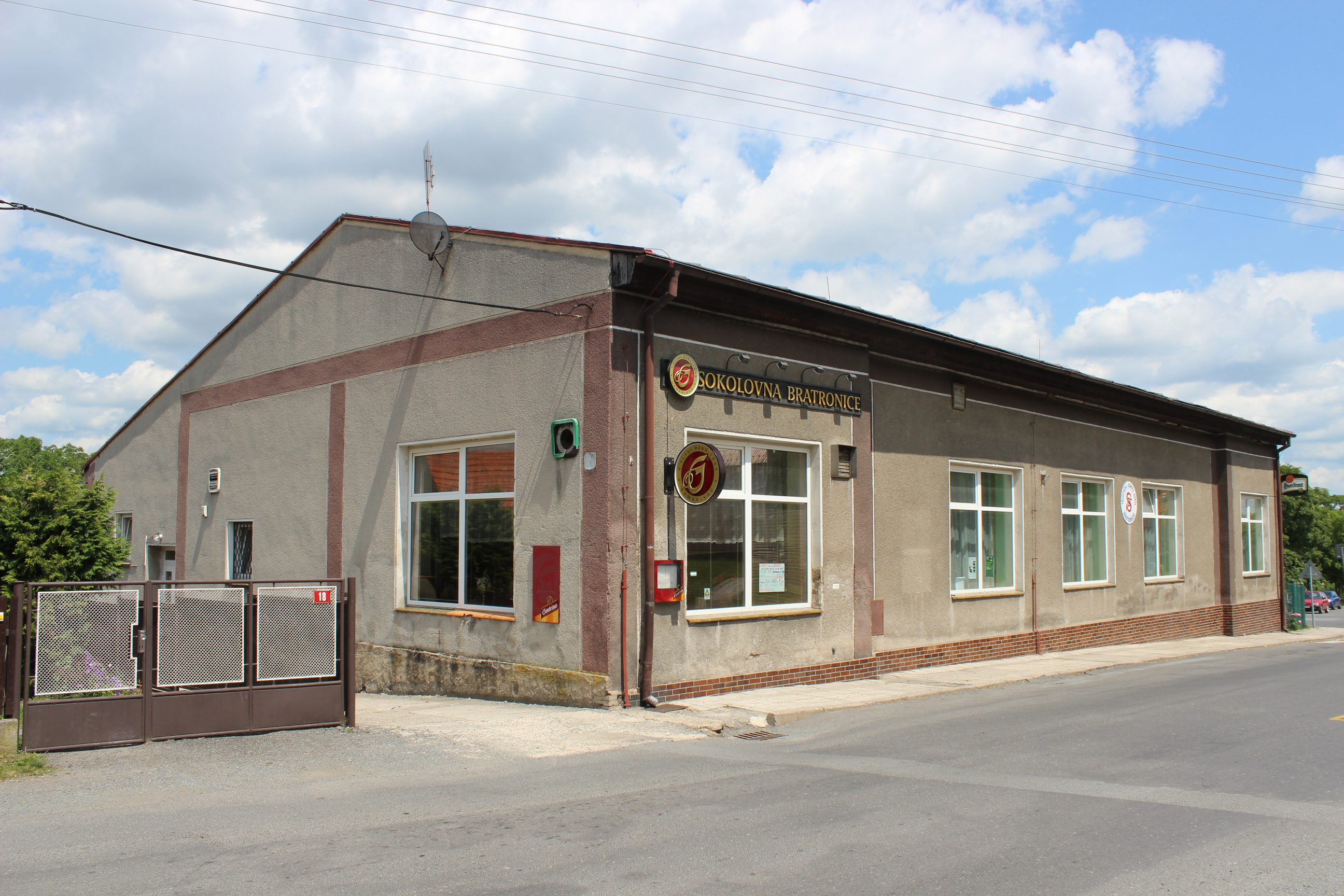 Sokolovna (dům číslo popisné 121) v Bratronicích v kladenském okrese (pohled od jihu).